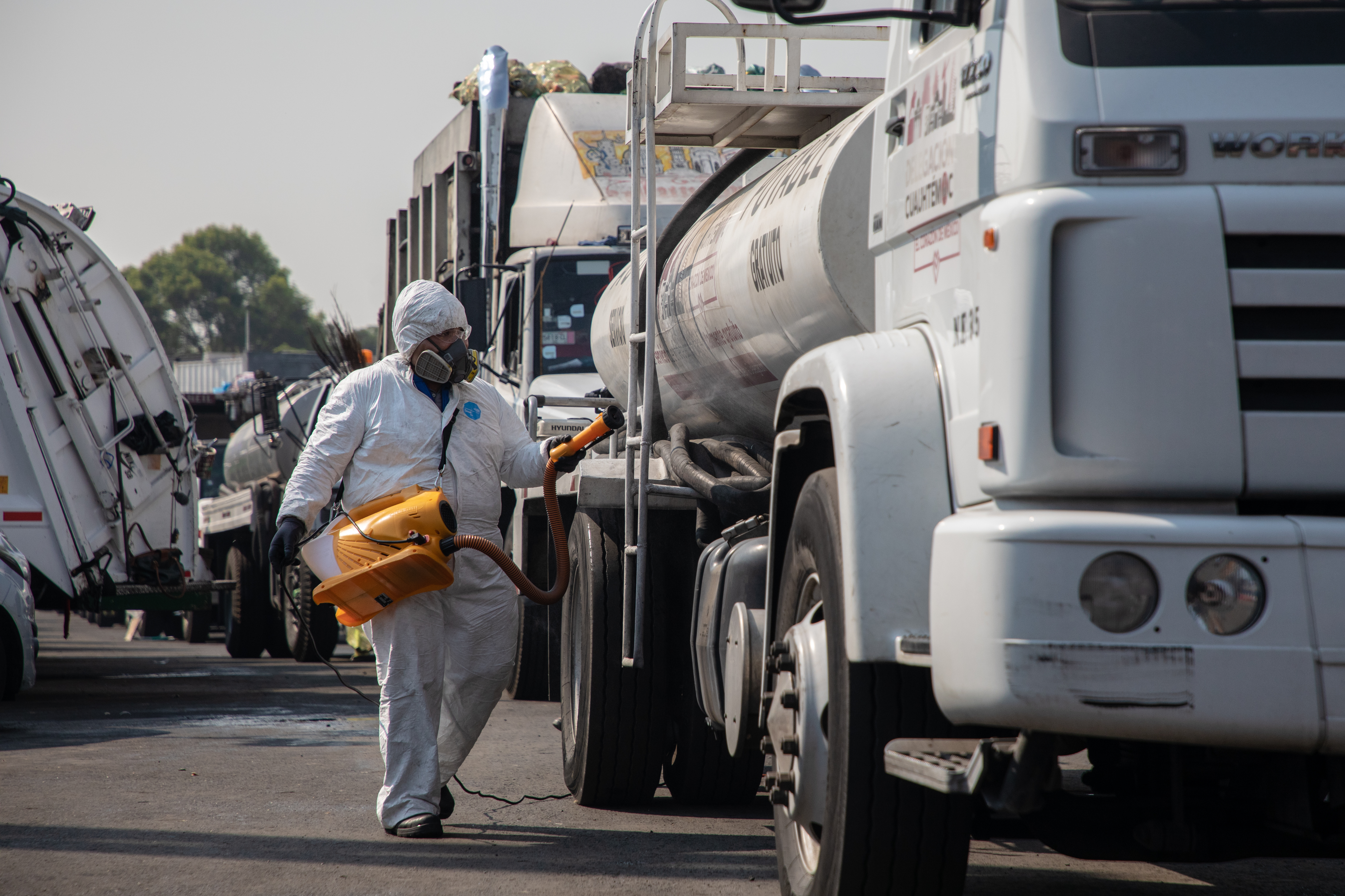 Trabajador de una empresa privada realiza la sanitización de los transportes recolectores de basura en la Alcaldía Cuauhtémoc de la Ciudad de México.